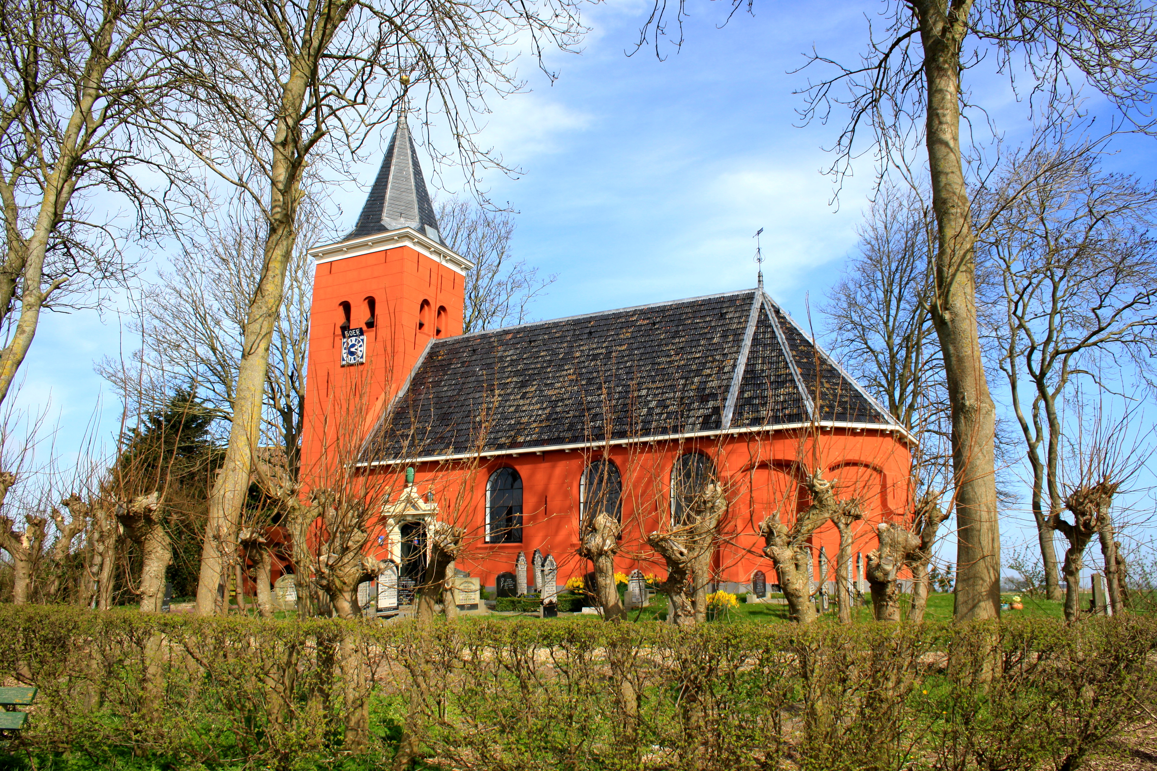 NH kerk in Boer (Friesland) gemeente Franekeradeel